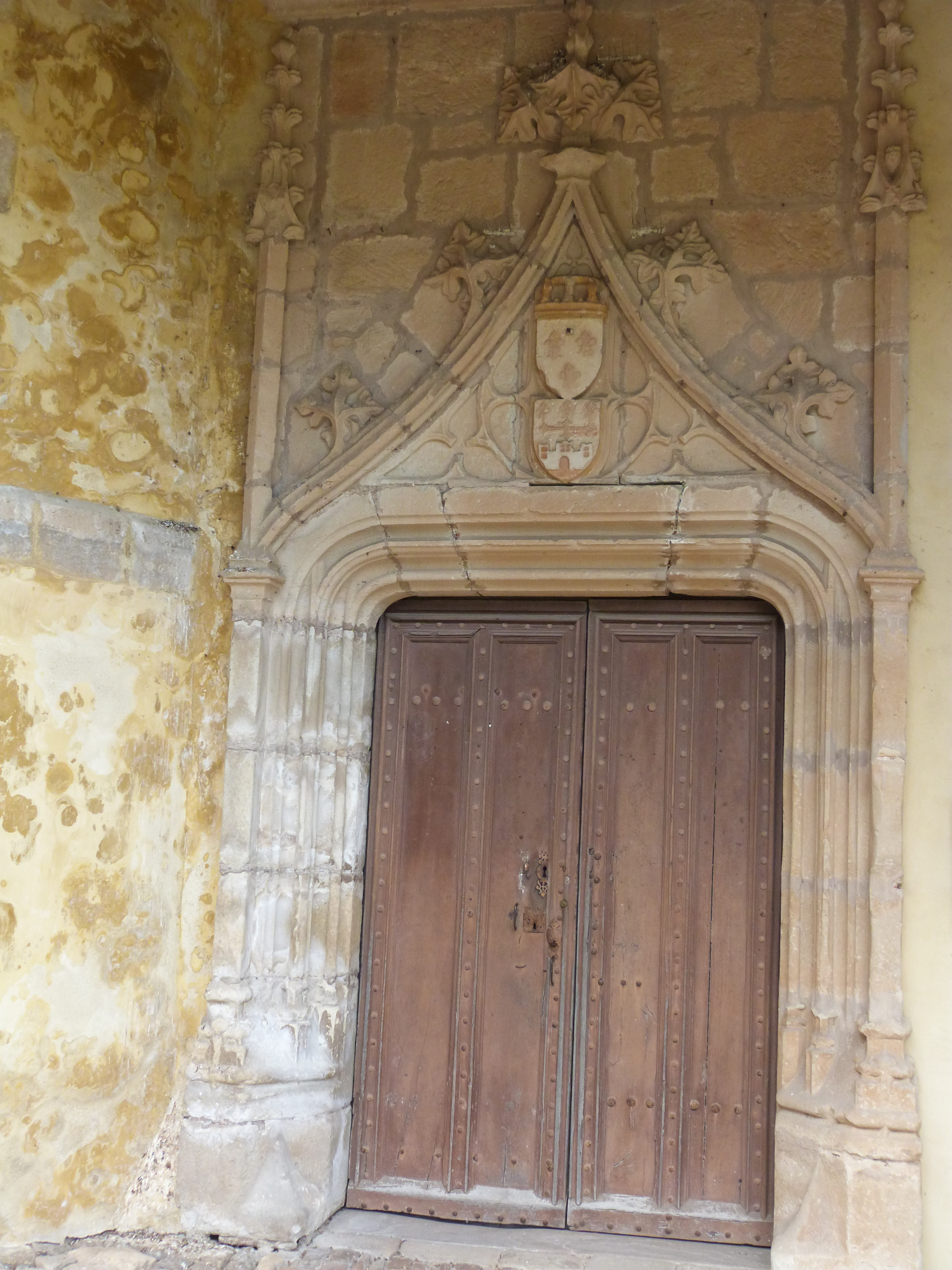 Chapelle du Saint-Crucifix .